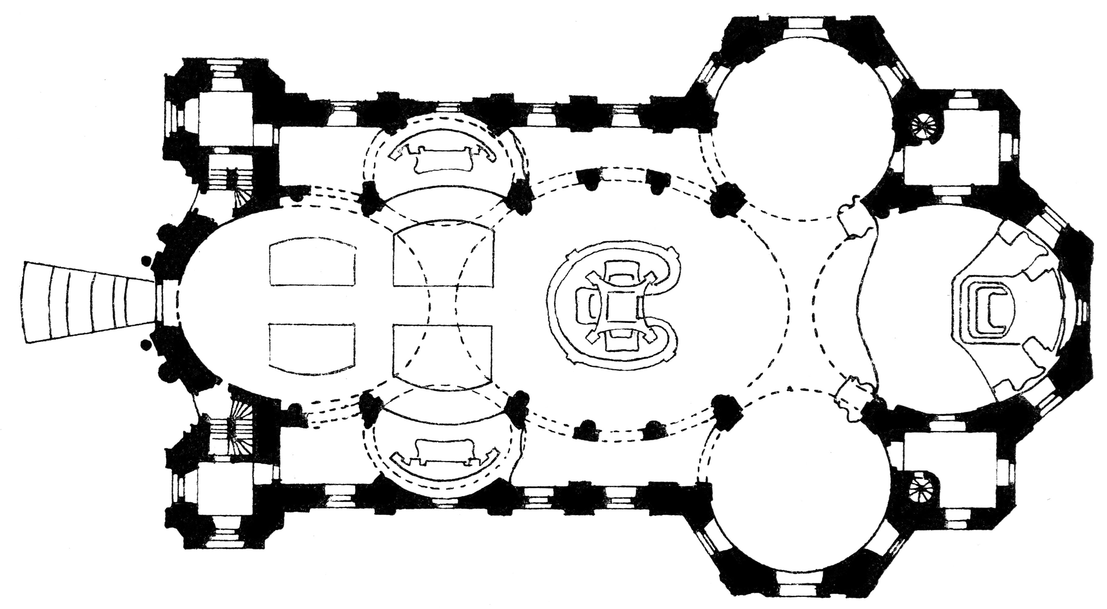 Vierzehnheiligen Floor Plan